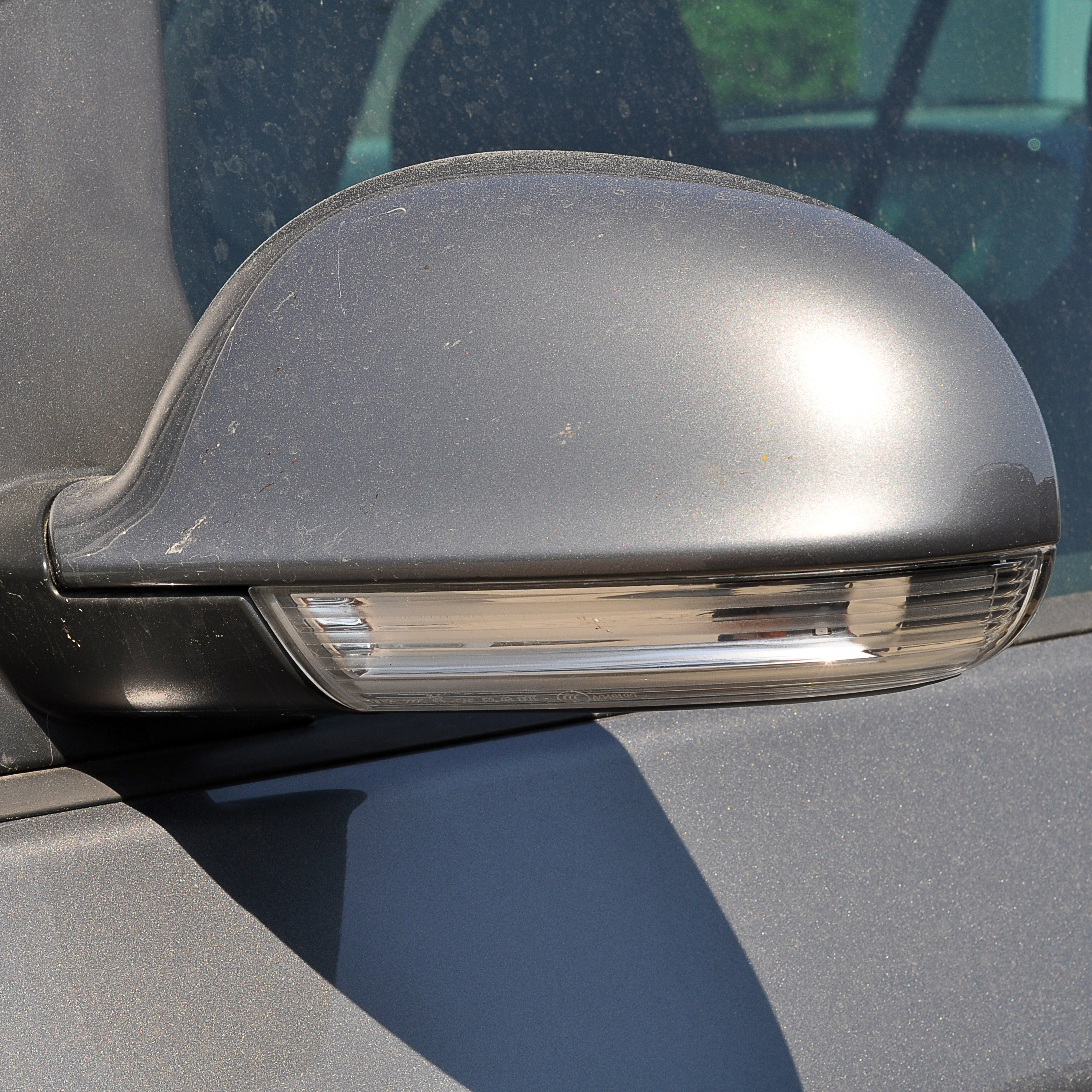 Detailaufnahme Volkswagen